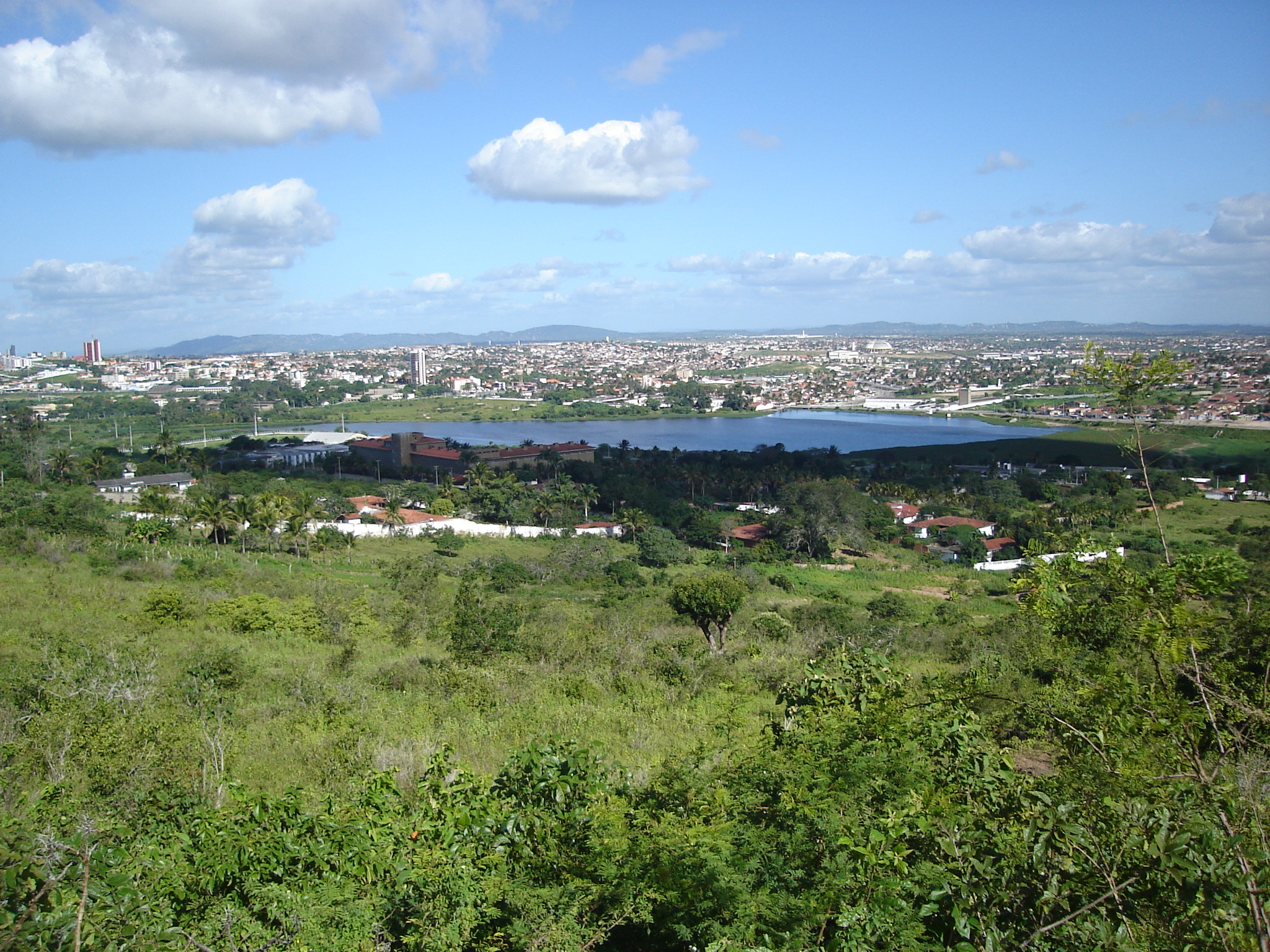 Açude de Bodocongó. Ano: 2006.